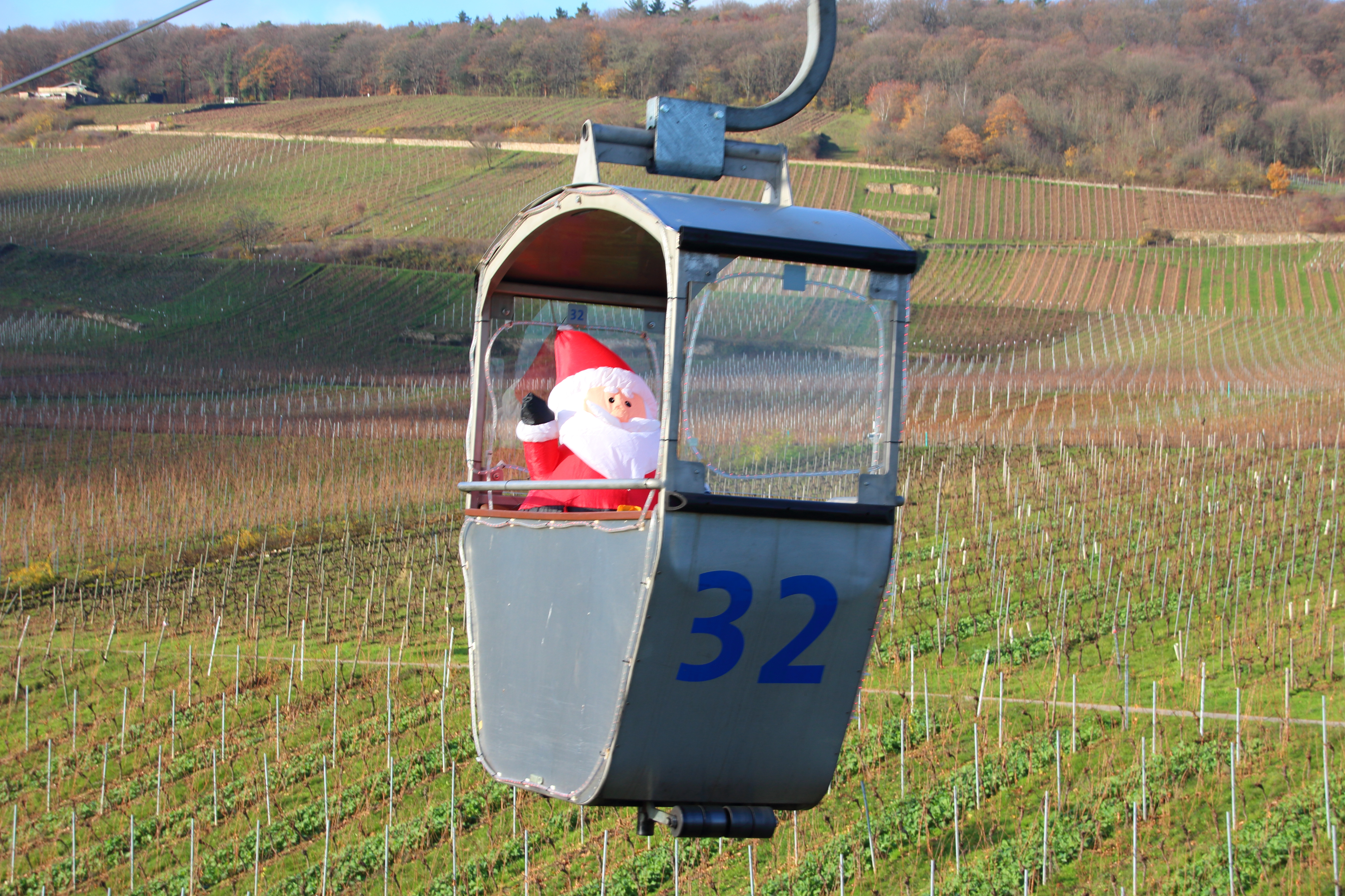 Seilbahn Rüdesheim am Rhein während der Adventszeit.